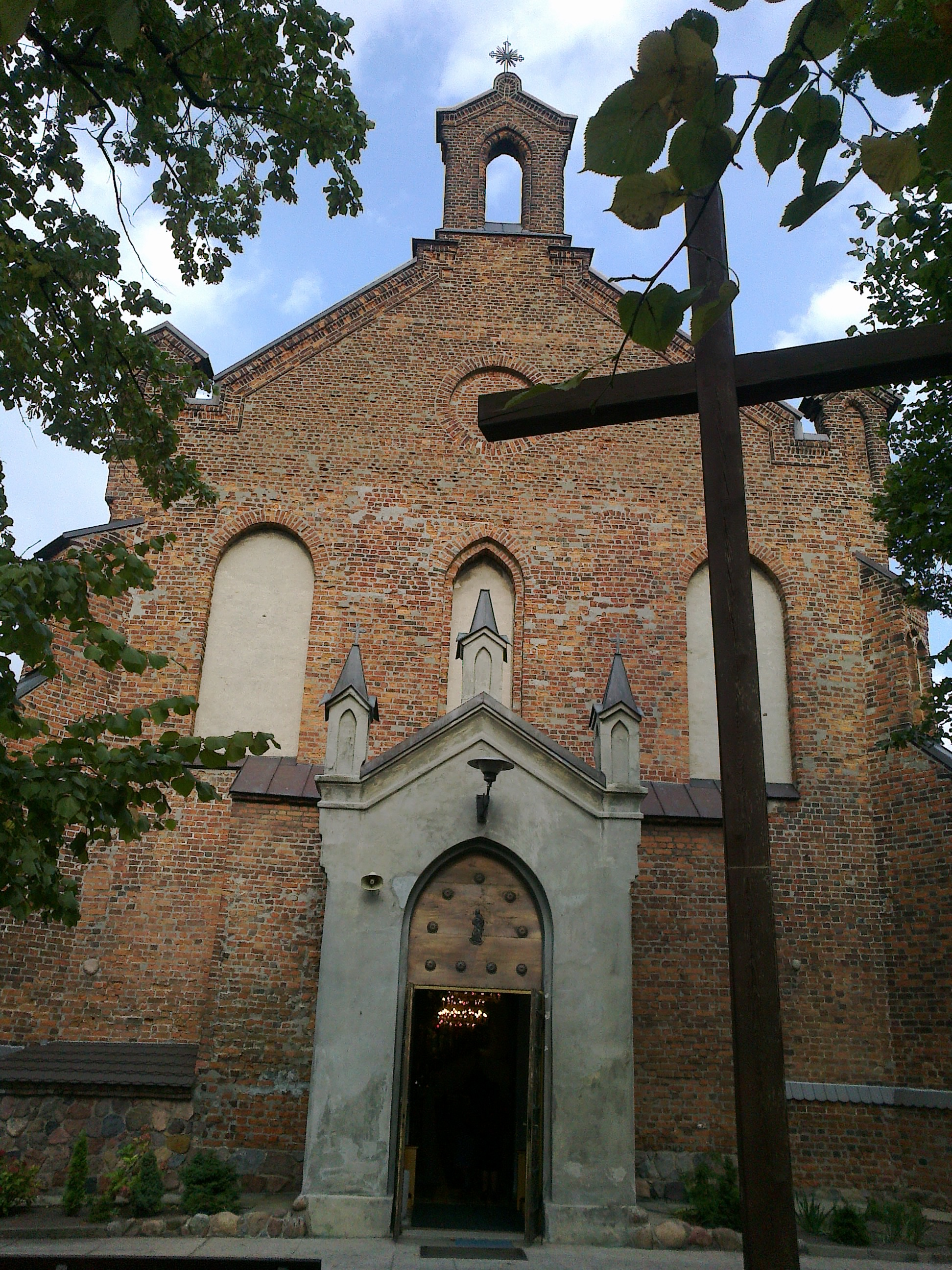 Kościół Wniebowzięcia Najświętszej Maryi Panny w Radziejowie (Kujawy)